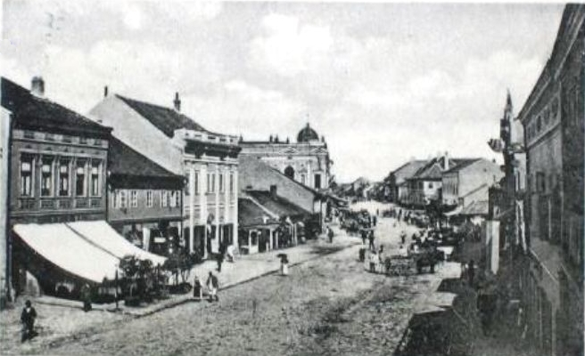 Hotel Pariz, 1904, pocetak Beogradske ulice